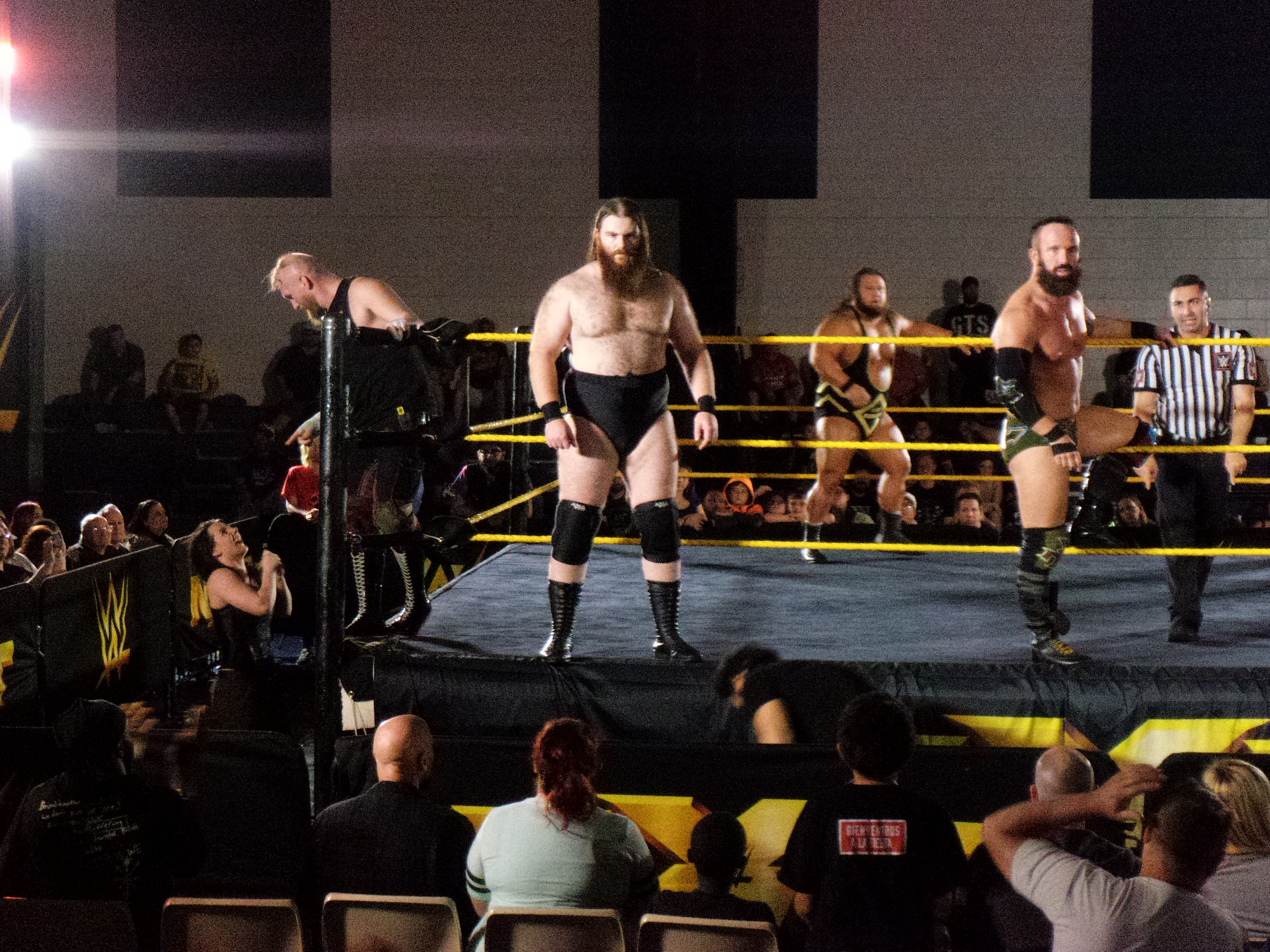 P_20170505_212447_003